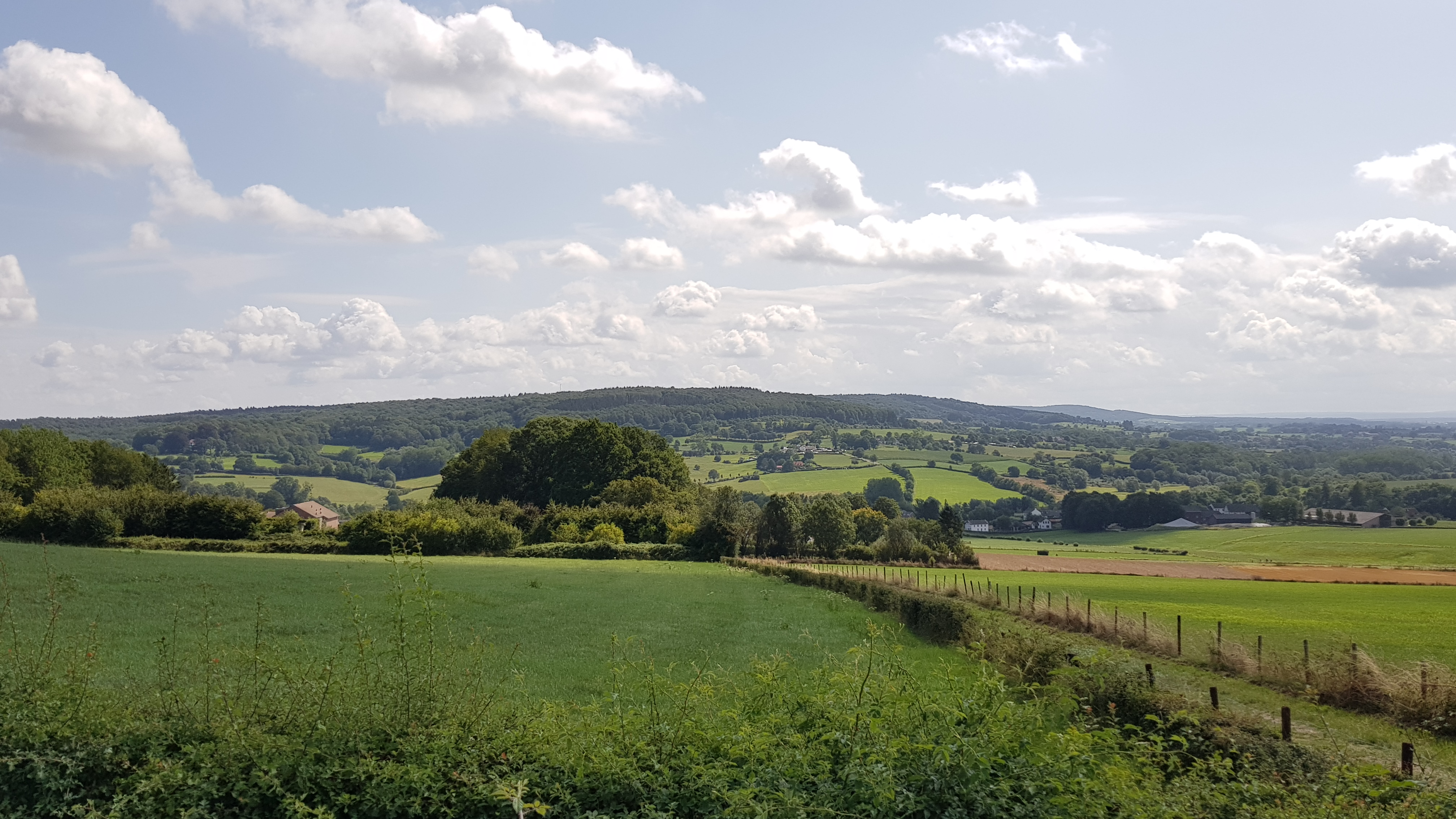 Vijlenerbos gezien vanaf Eperheide (Krijtland), Epen, Nederland